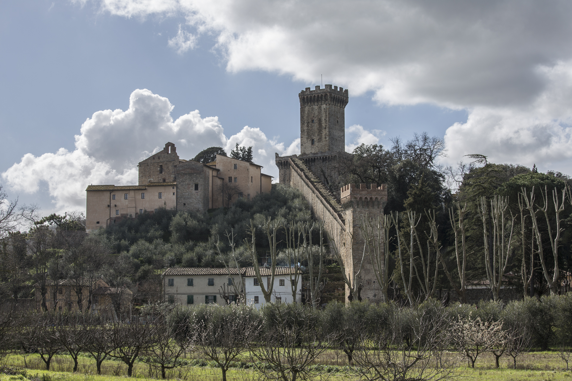 Torre del soccorso This is a photo of a monument which is part of cultural heritage of Italy.